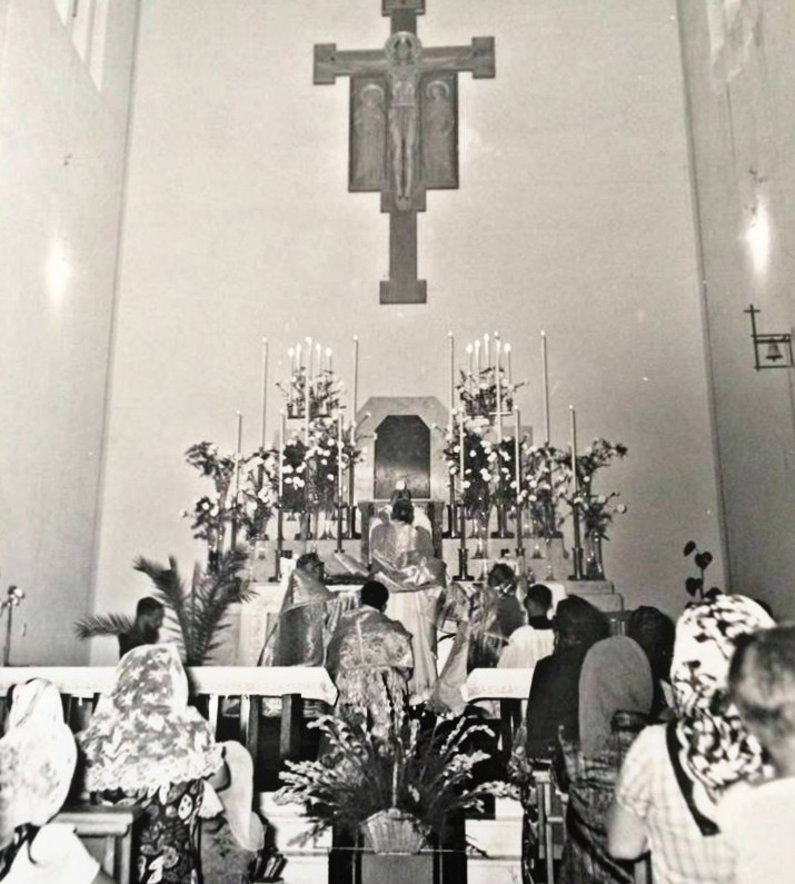 Foto di Santa Maria Assunta Nizza di Sicilia